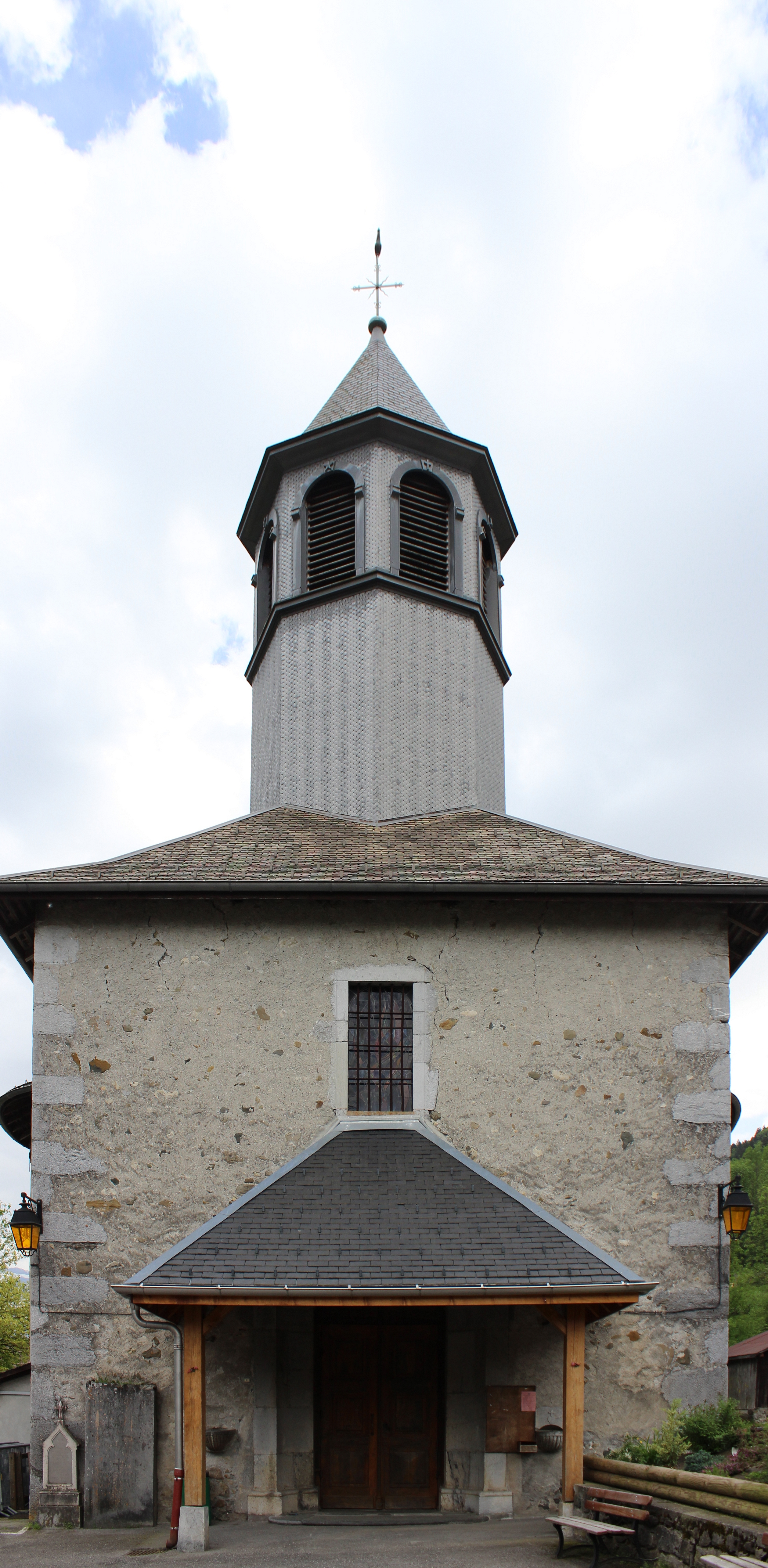 Église de La Rivière-Enverse.